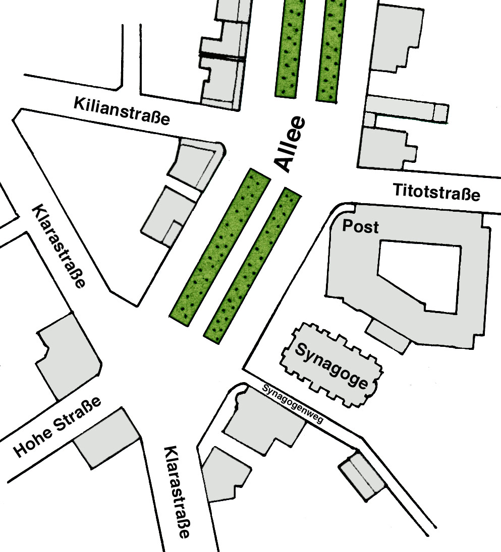 Plan der südlichen Allee in Heilbronn. Der Plan gibt die Gebäudesituation 1939 wider und berücksichtigt dabei auch den Standort der 1938 geschändeten und 1940 abgerissenen Synagoge.